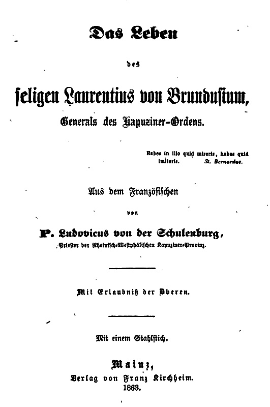 Graf Hermann von der Schulenburg (auch Pater Ludovikus von der Schulenburg)(1829-1865) deutscher Kapuziner, Buchtitelblatt eines religiösen Werkes